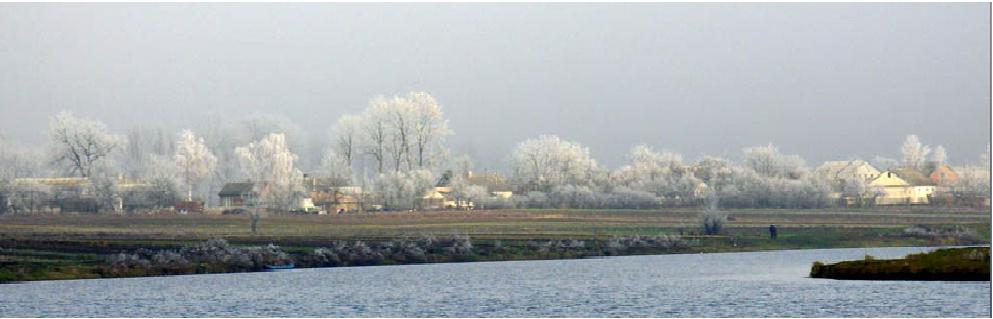 На цій фотографії зображене частина села Ганнопіль!